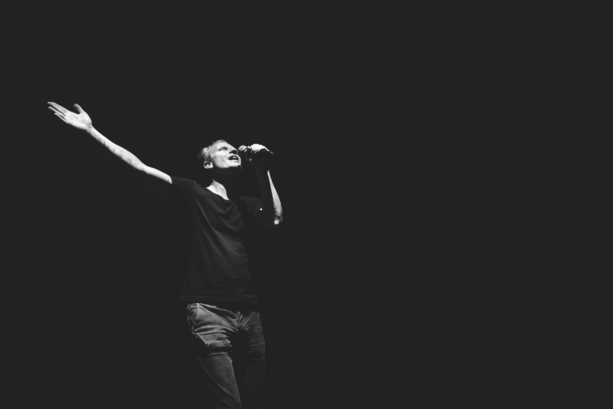 Burningboy3